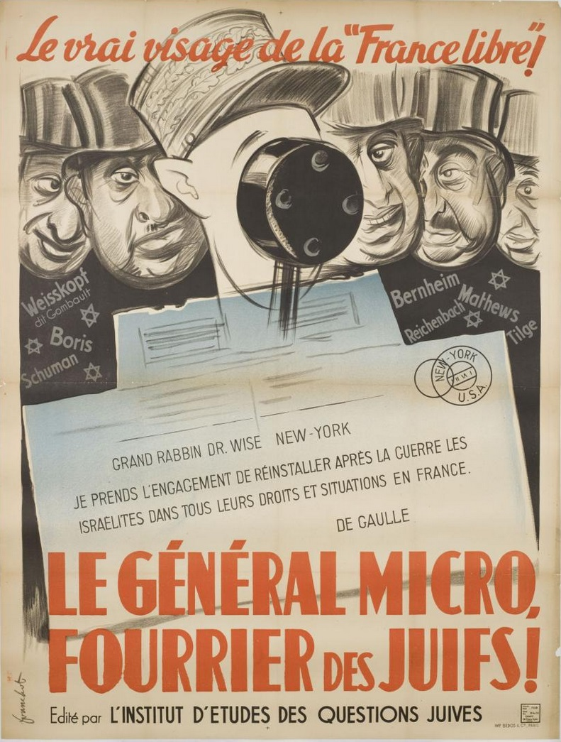 Affiche antisémite et anti-gaulliste éditée par l'Institut d'étude des questions juives en novembre 1941. Dessin de Franchot.